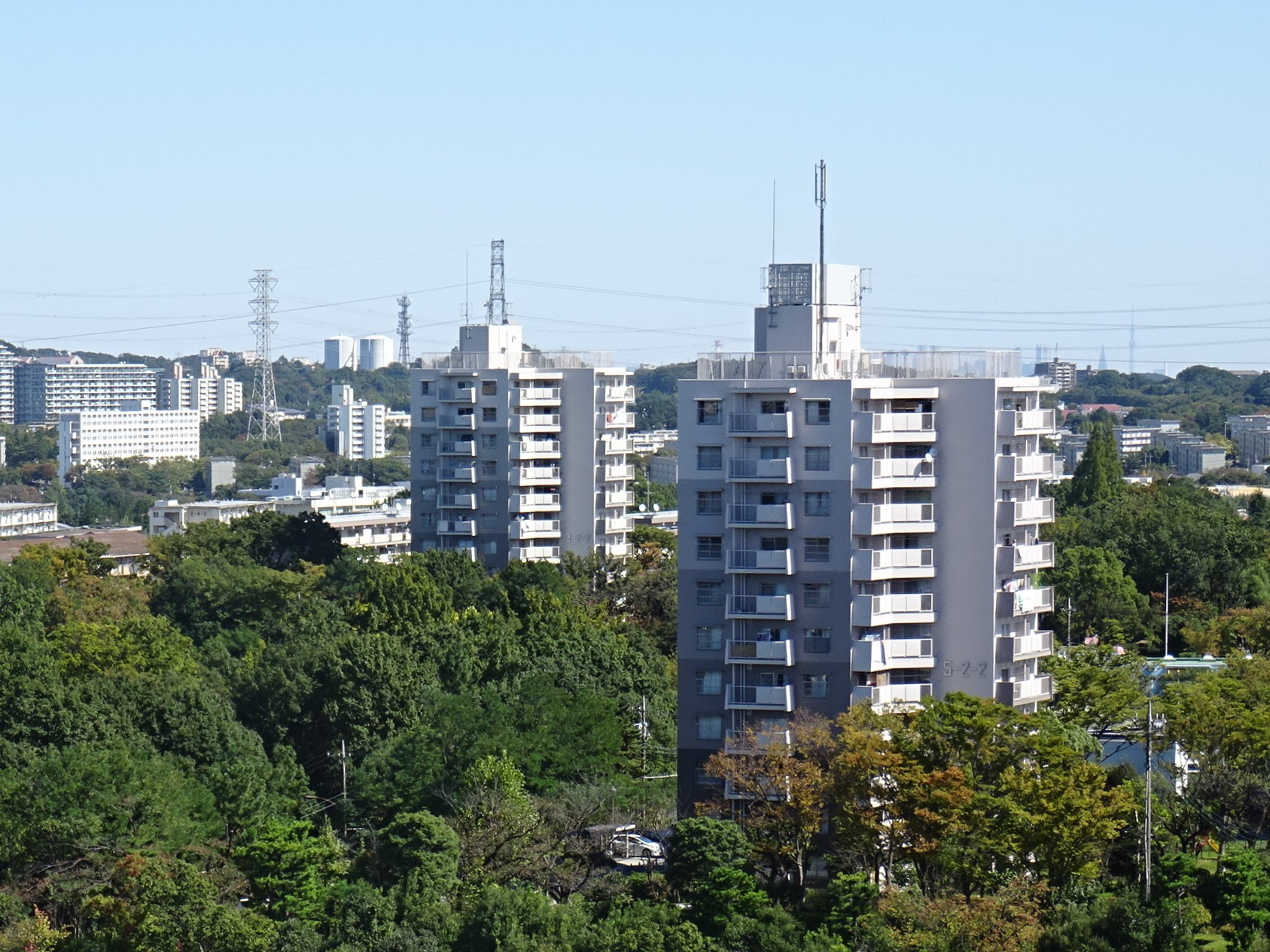 多摩市豊ヶ丘における多摩ニュータウンの初期に開発された街並み（2015/10/08撮影）